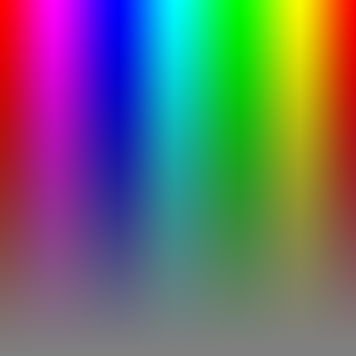 Carré de la saturation des teintes primaires